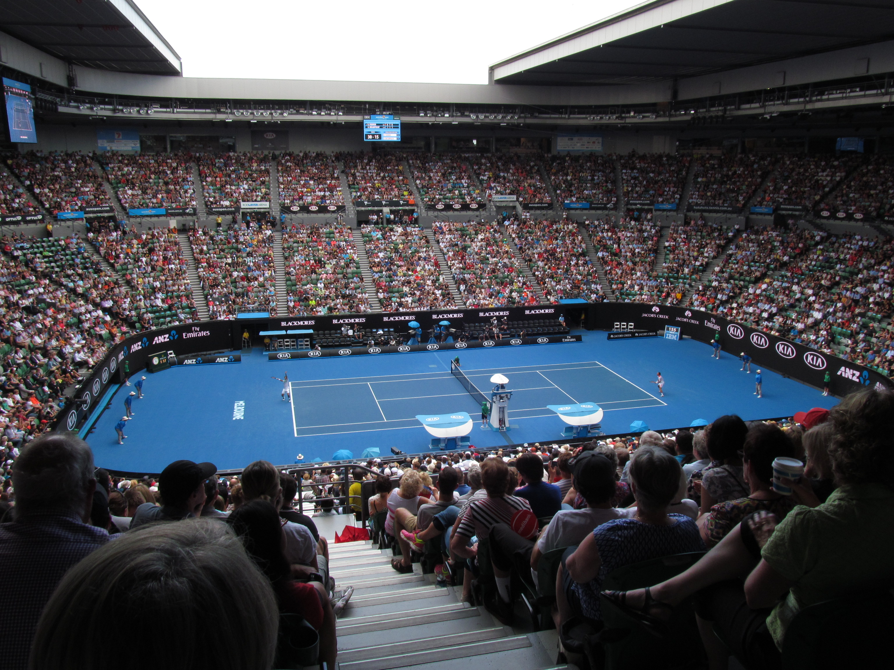 罗德·拉沃竞技场，图中可见活动屋顶处于半开启状态。正在进行2016年澳大利亚网球公开赛的一场男子单打比赛。左边发球者是瑞士选手罗杰·费德勒；右边接发球者是乌克兰选手亚历山大·多尔戈波洛夫。